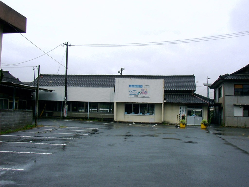 山鹿駅舎。鉄道廃止後の姿。